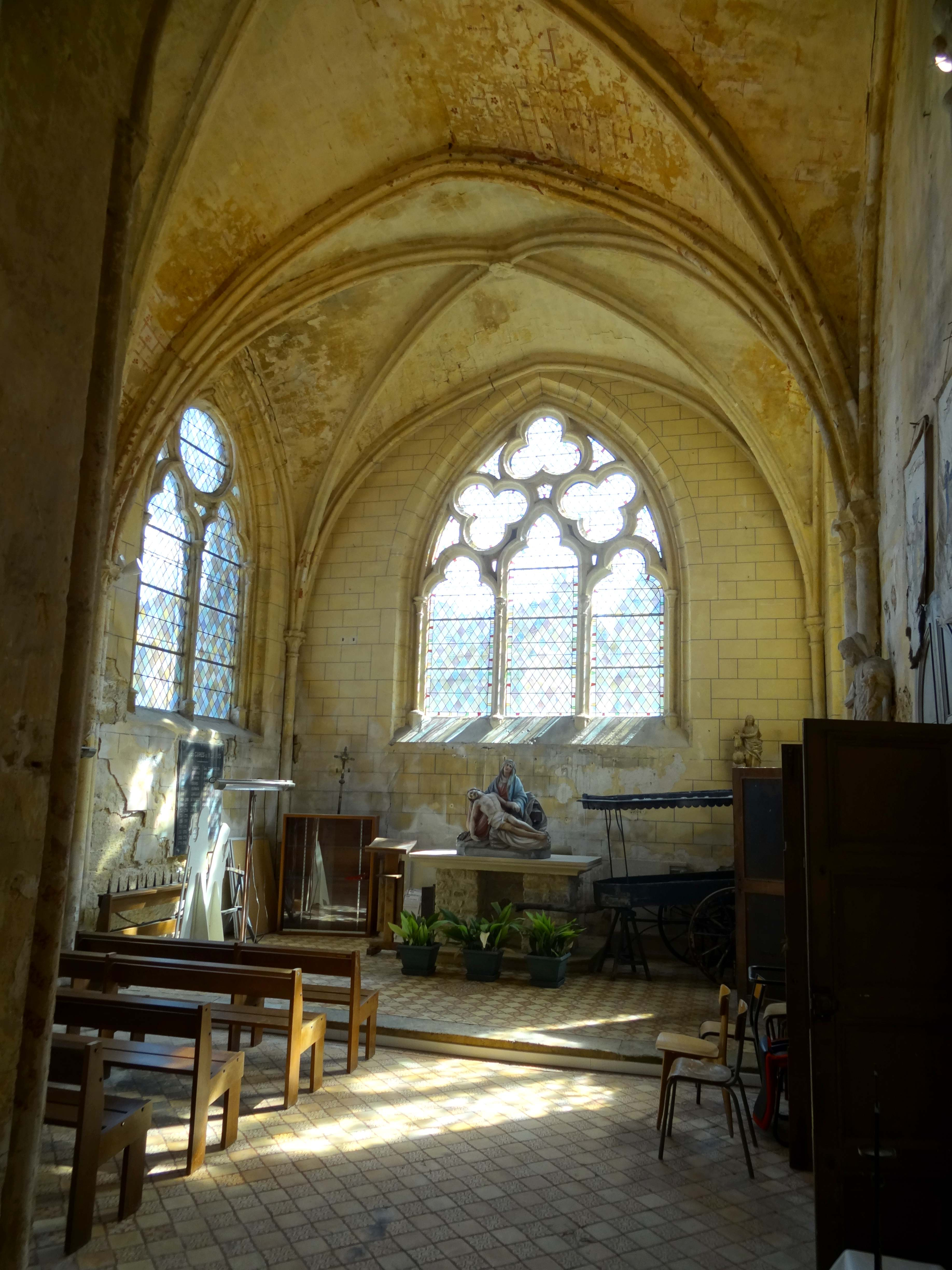 Intérieur de l'église - voir titre.